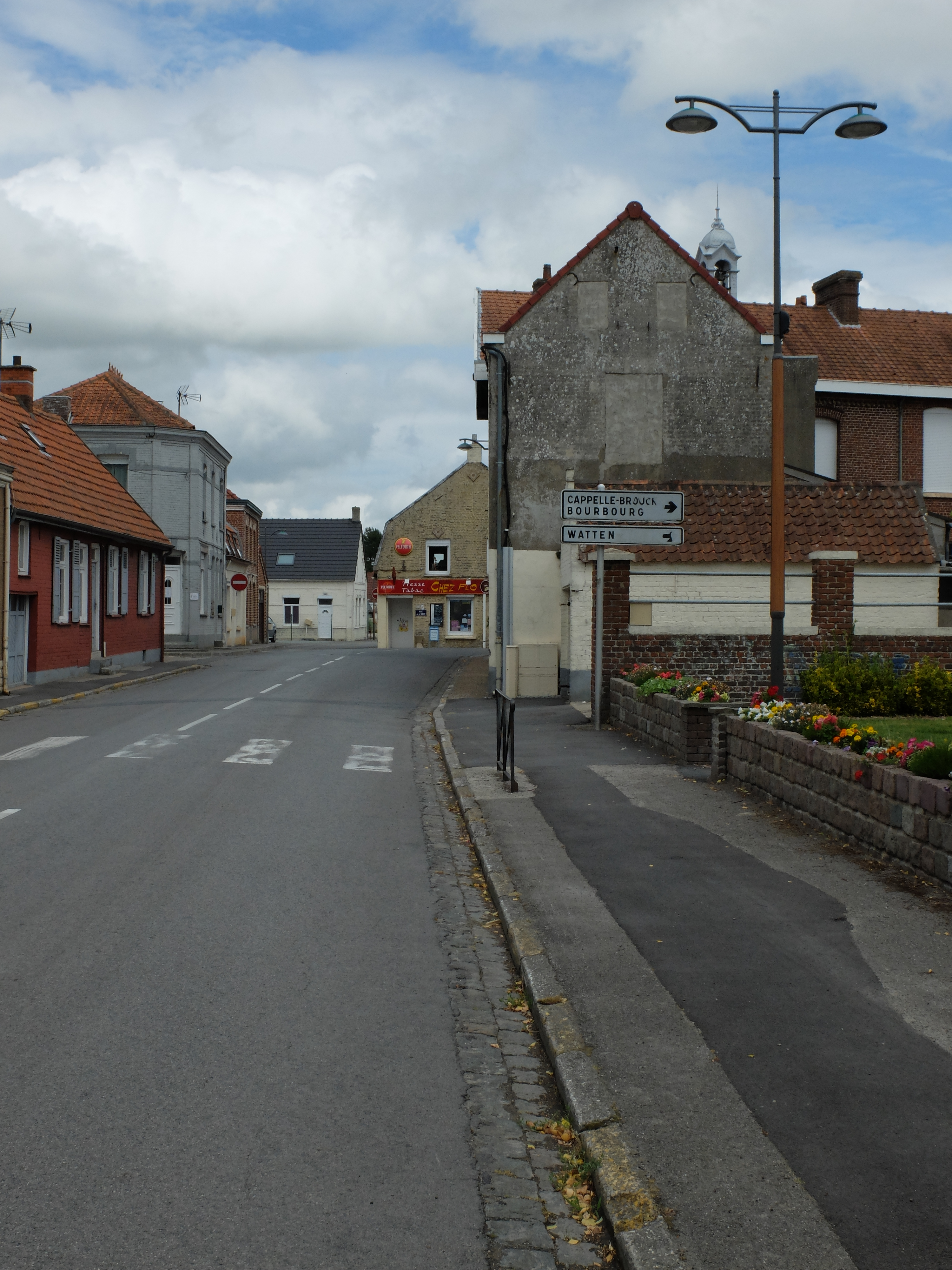 Vue de la rue de la Bistade de Saint-Pierre-Brouck.